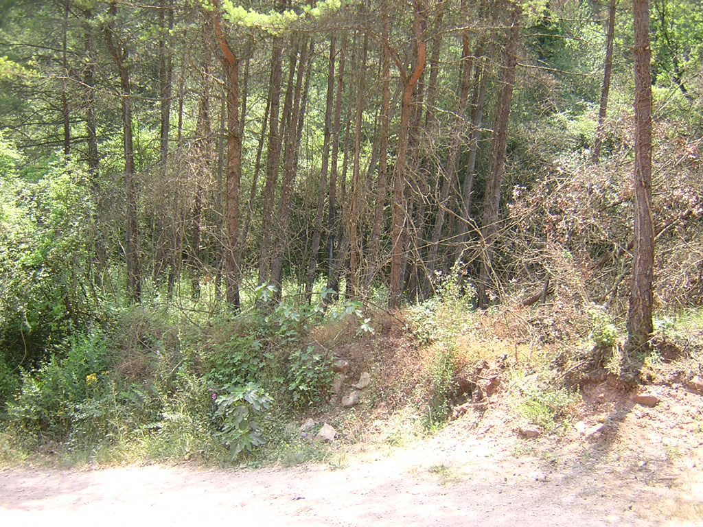 L'Hort del Coll, des del costat de ponent (Monistrol de Calders, Moianès)